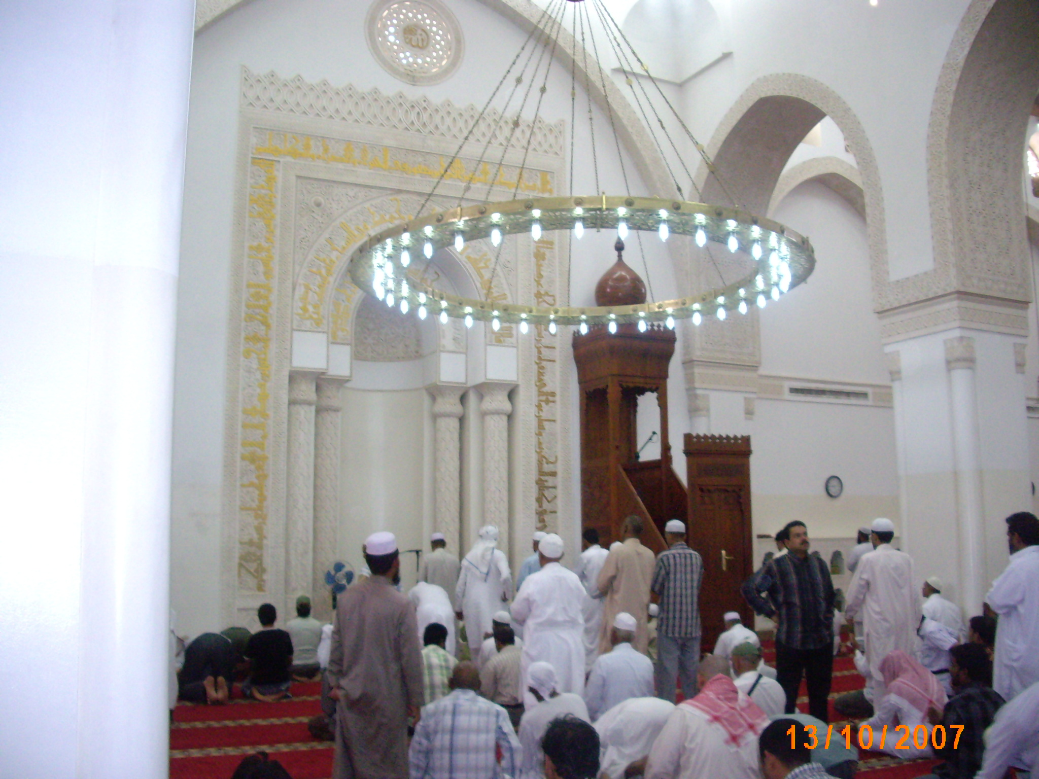 ഖിബ്‌ലതൈൻ മസ്ജി ഉൾവശം മദീന. സ്വയം എടുത്ത ചിത്രം